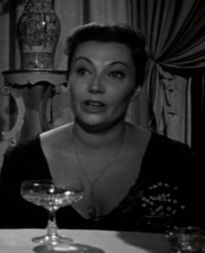 Screenshot dal film Carosello di canzoni (1958) estratto personalmente